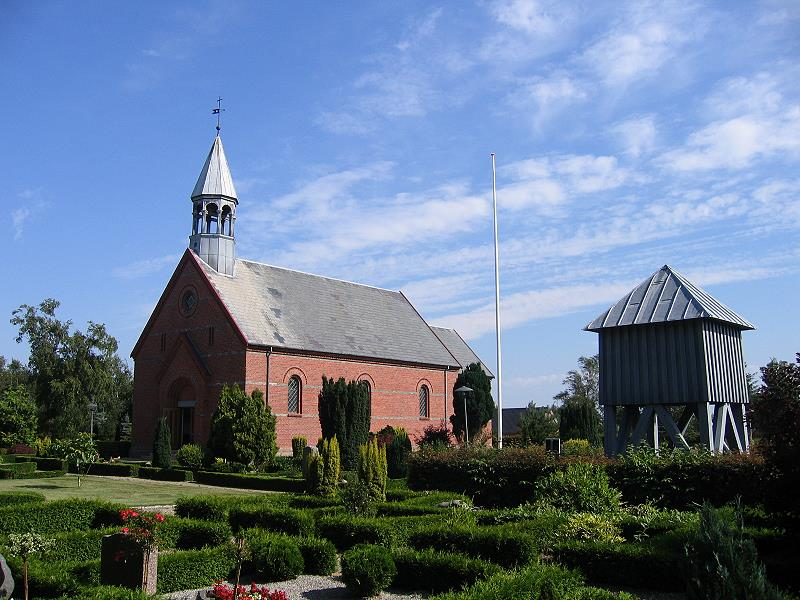 Jerup Kirke fra vest